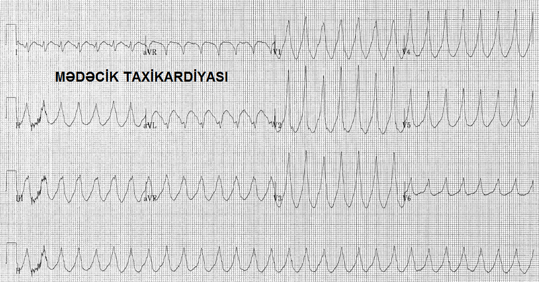 Kardiogen şok zamanı EKQ-də qeydə alınmış mədəcik taxikardiyası